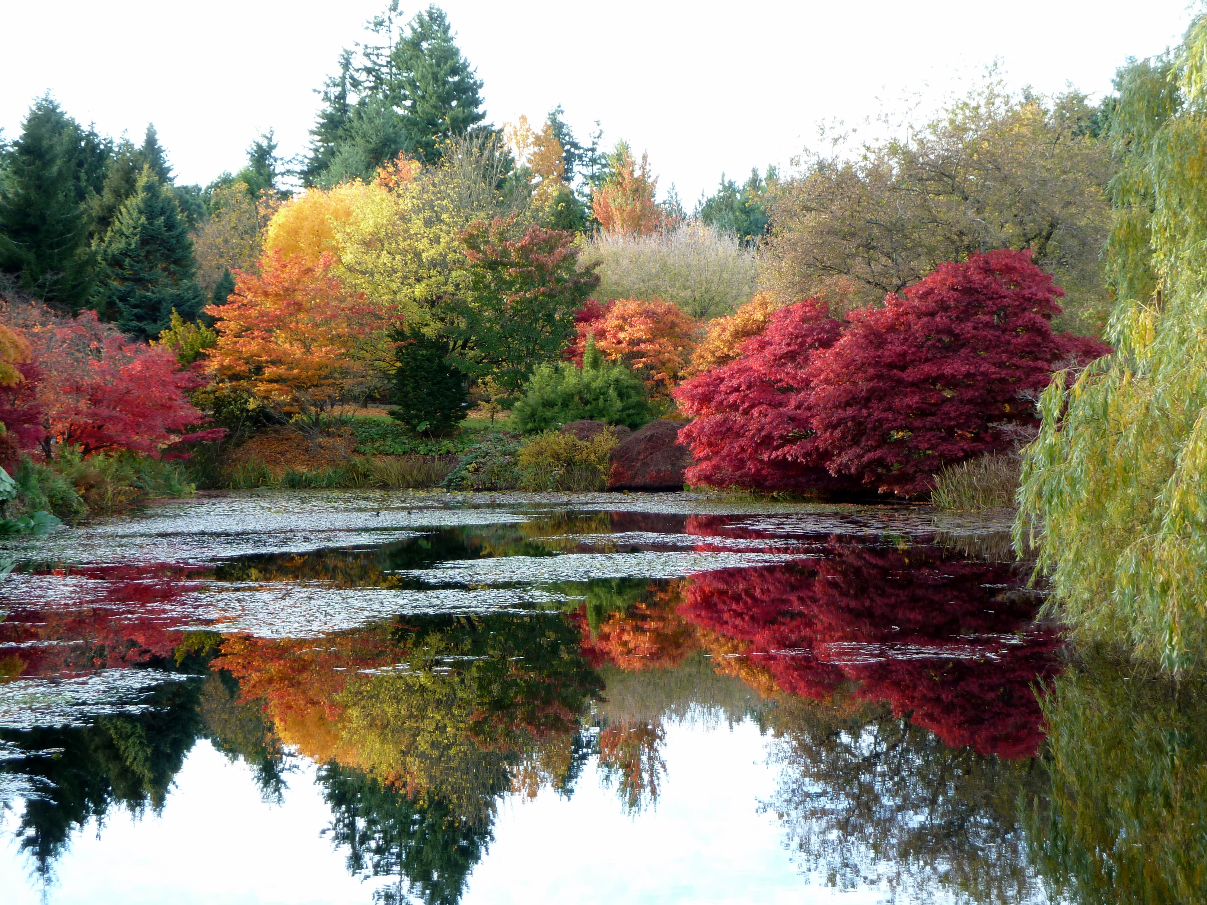 Autumn colours at VanDusen Botanical Garden